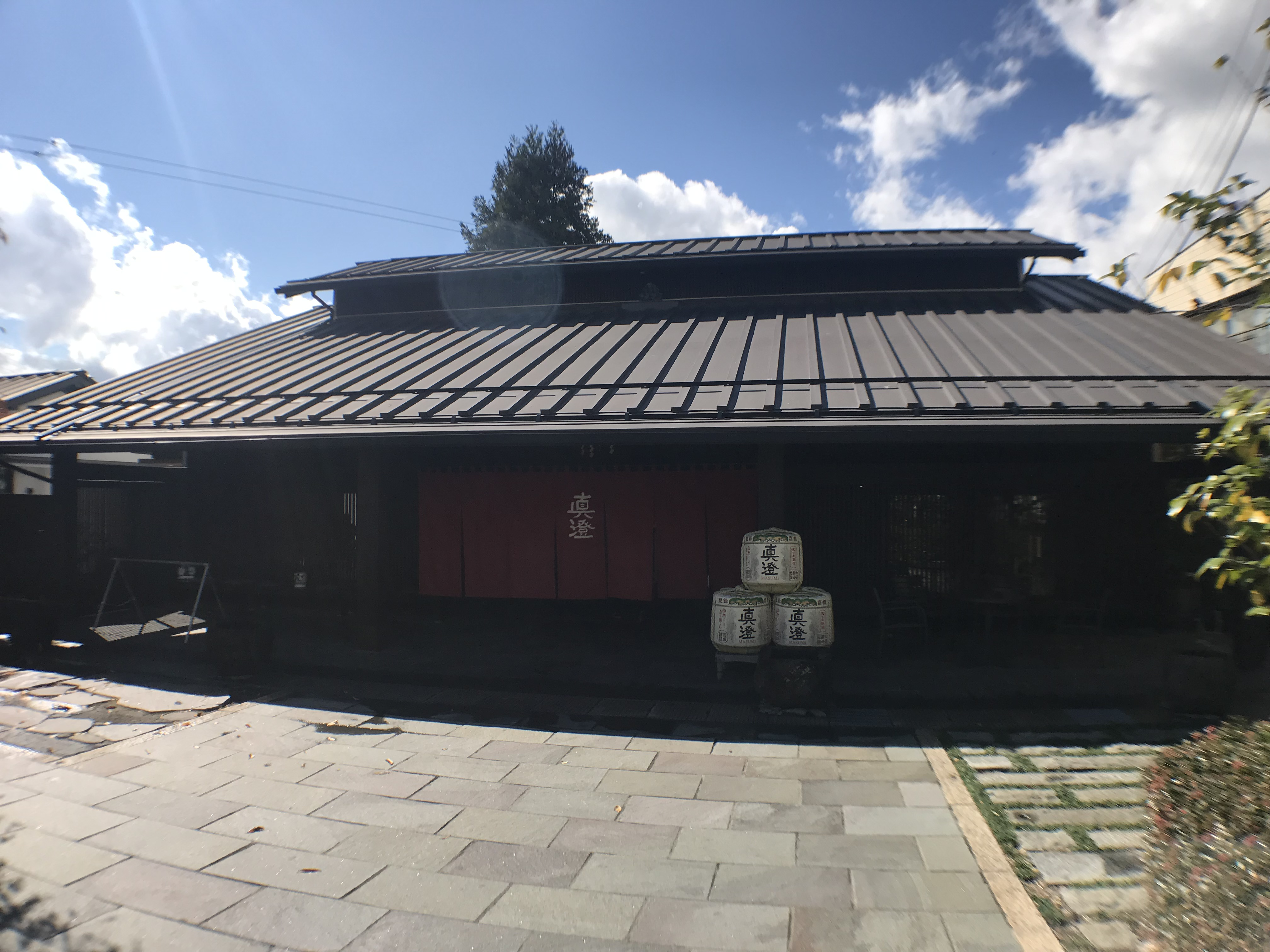 宮坂醸造の蔵元直販ショップ「セラ真澄」の正面全景